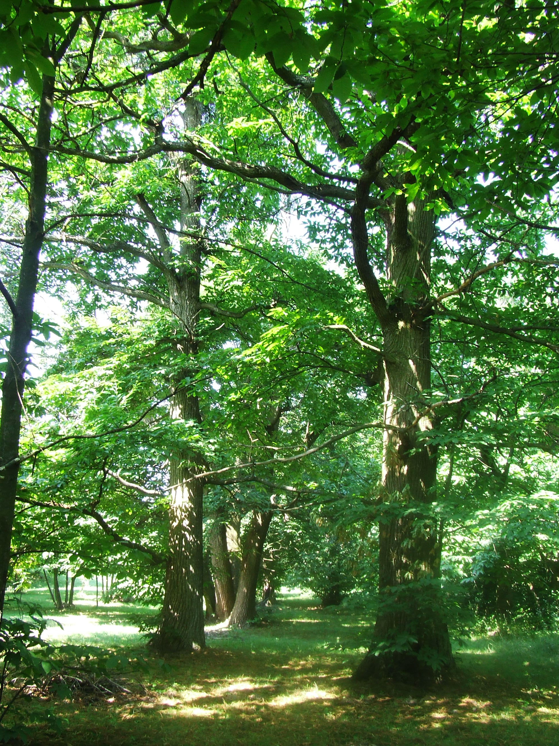 több 100 éves gesztenyefák (Iharosberény)